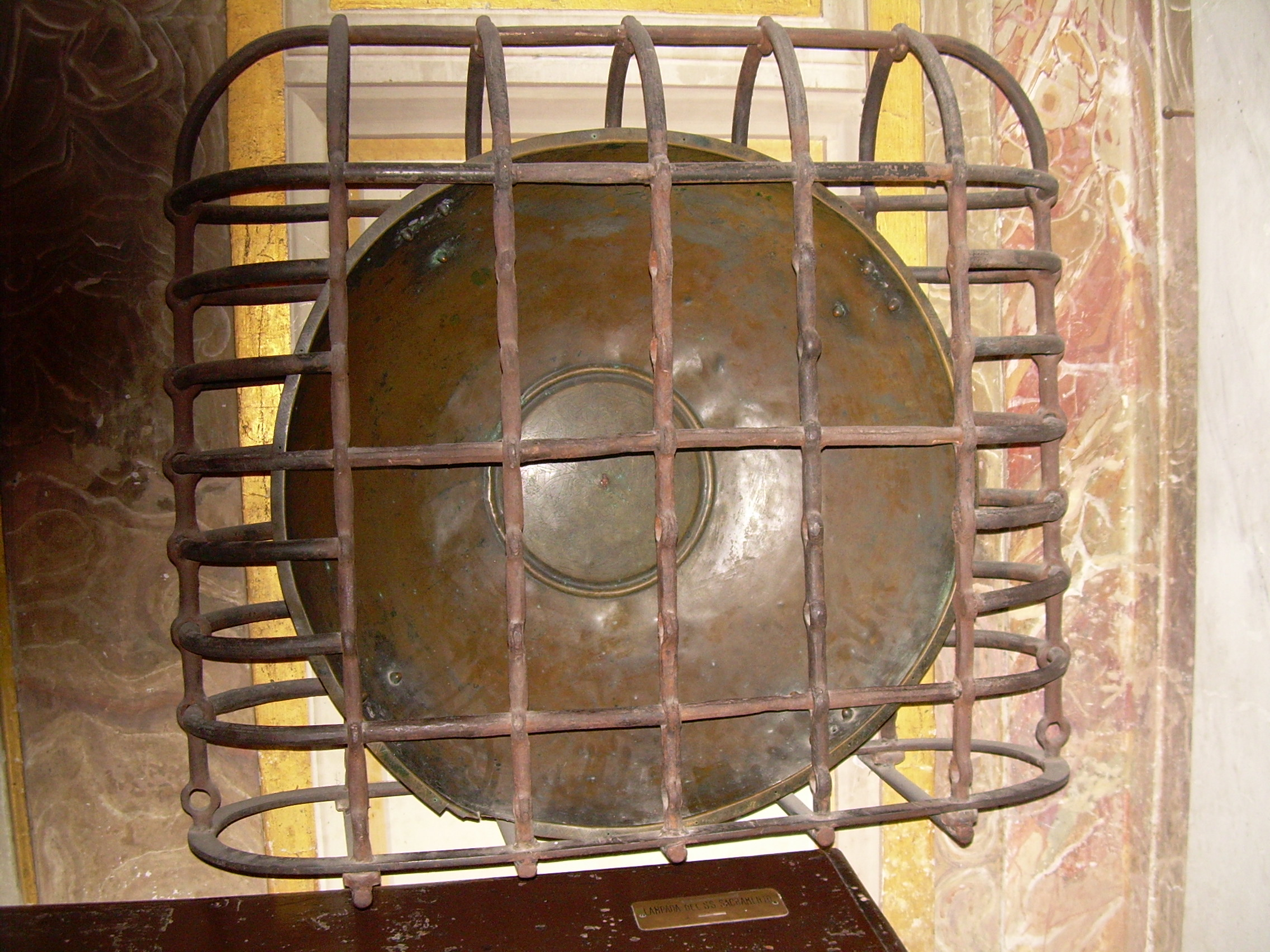 Catino utilizzato per il trasporto di San Bartolomeo Apostolo da Benevento a Roma da parte di Ottone III